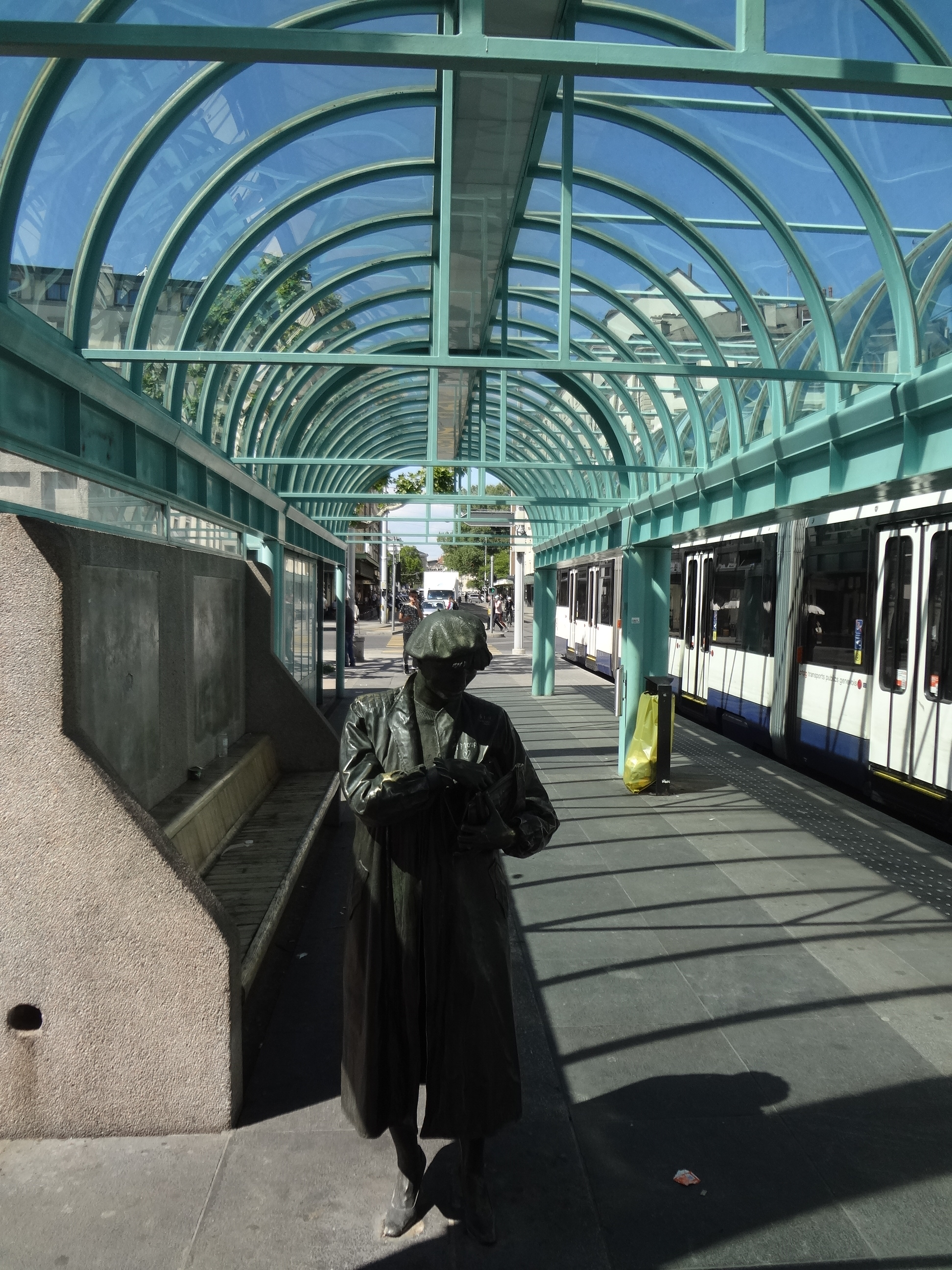 Kiosque du Rond-Point de Plainpalais à Genève, abri côté ouest, avec lune des sculptures de Aldus.